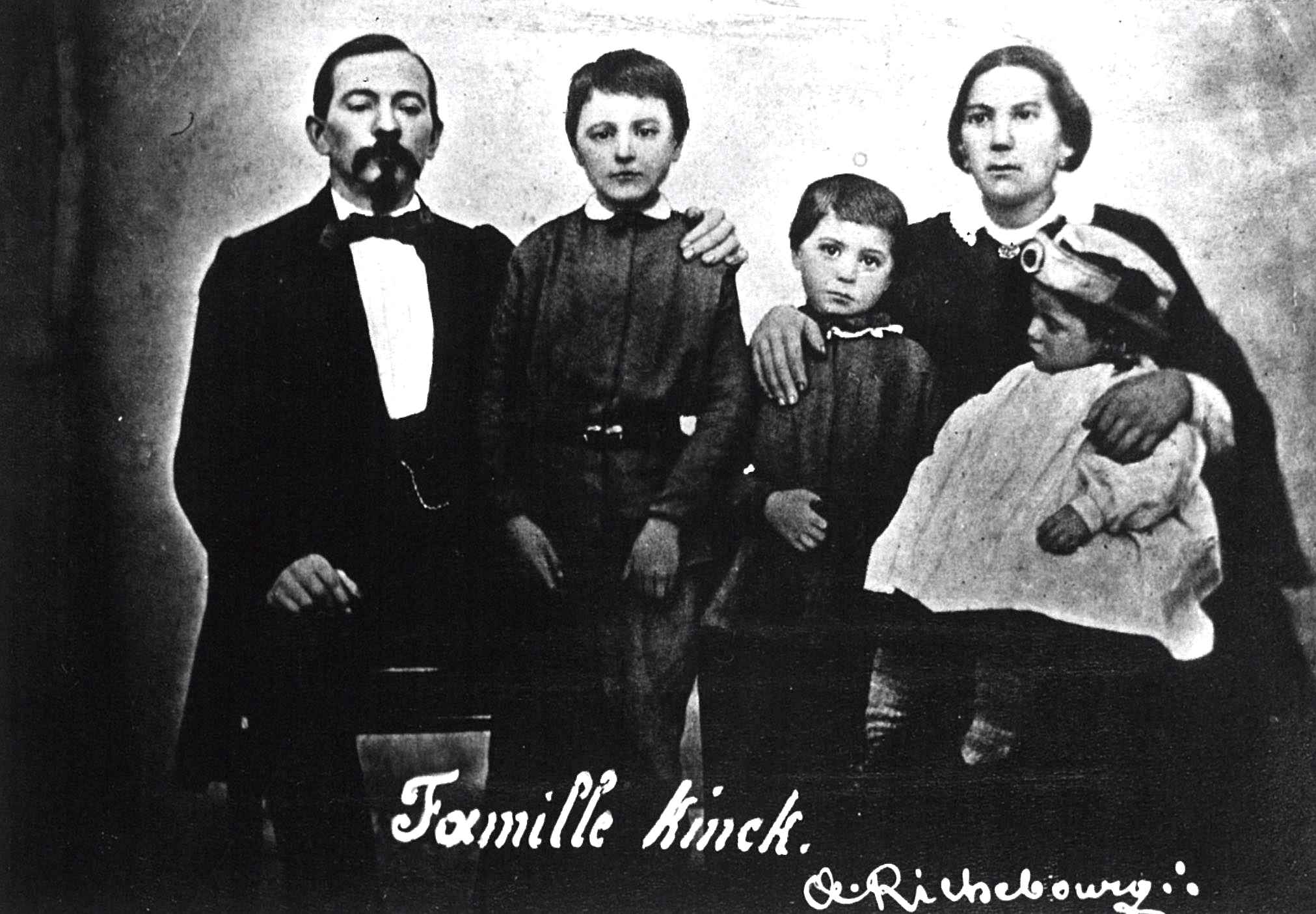 Portrait photographique des membres de la famille Kinck, victimes de Jean-Baptiste Troppmann.